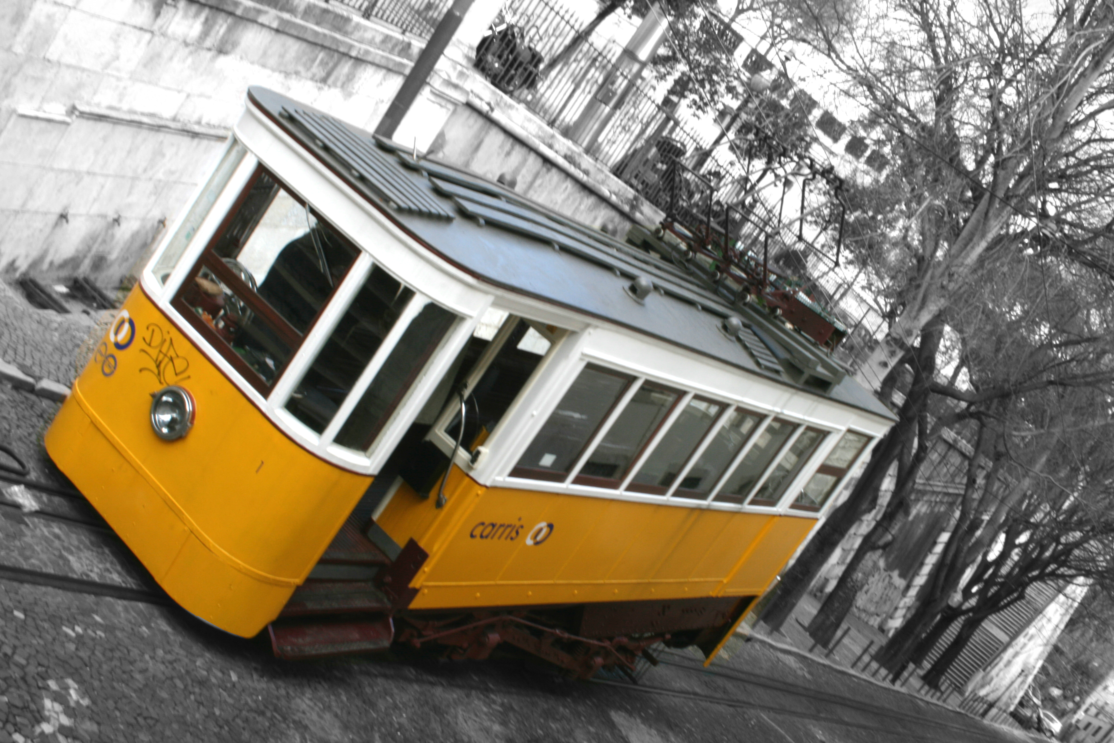 Glória Funicular